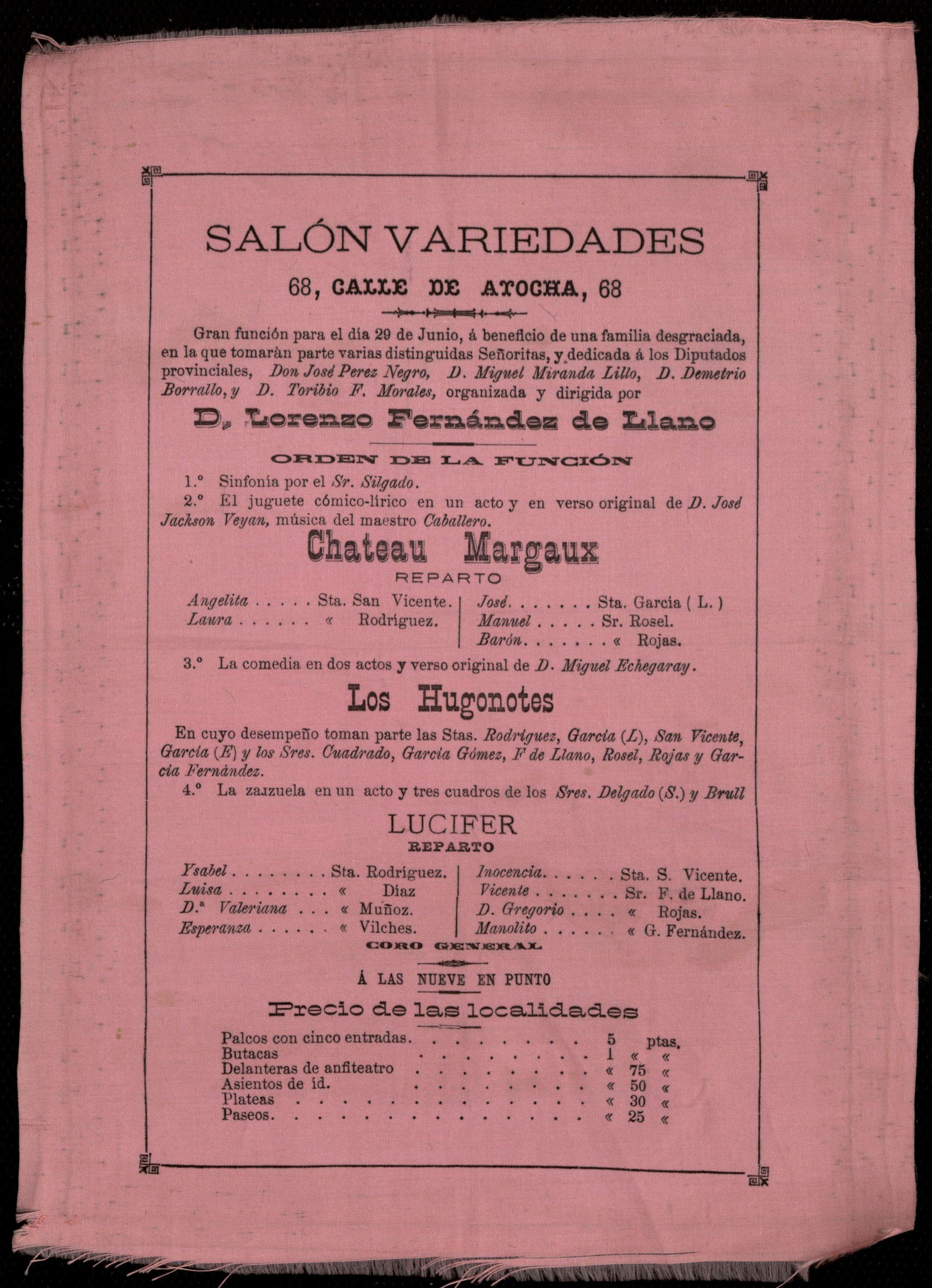 . Programa para el 29 de junio de 1892 en el Salón Variedades del Liceo Ríus de Madrid, España.